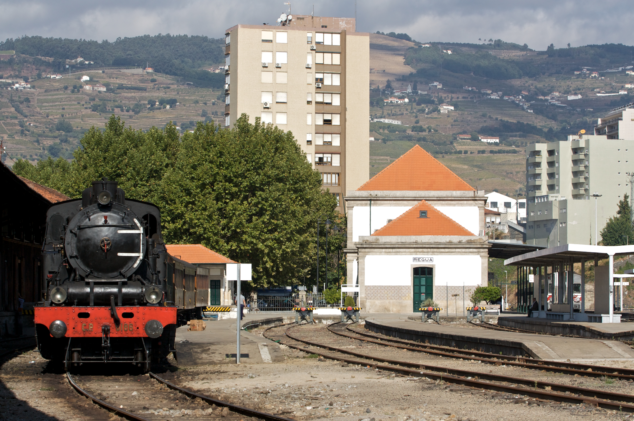 preparações para o Comboio histórico. Tipo: E [Estação] Local: Peso da Régua Linha do Douro, PK 103 • Linha do Corgo, PK 0,0] Data e hora: 2 de Outubro de 2010 [10h36] Material: Locomotiva 0186 (ex-01206) Henschel 2-8-4, 1924]